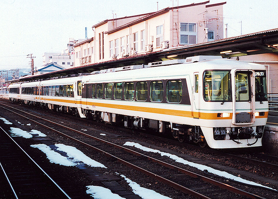 名鉄 キハ8500系気動車 特急北アルプス